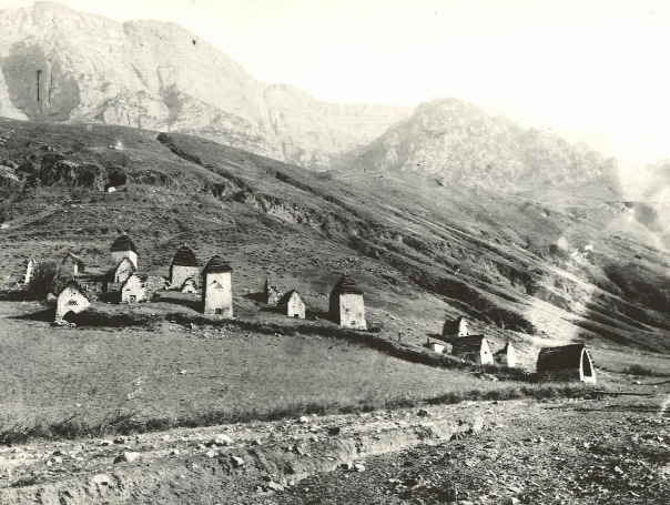 Склеповый могильник с. Таргим, 1921 г